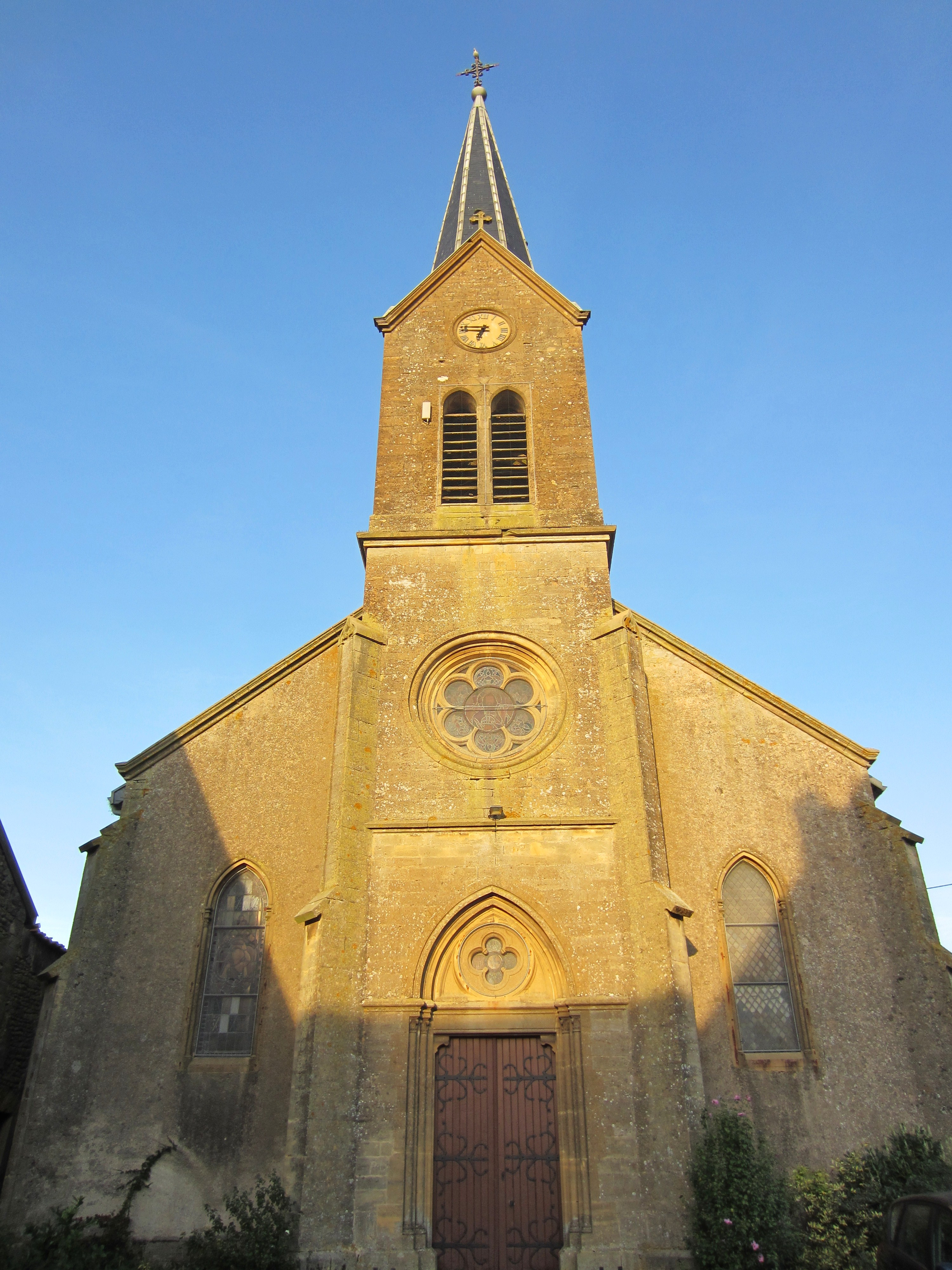 Description eglise Affleville eglise Affleville